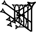 Sumer írásjel: ARATTA. Akkád kabtu, tanattu (KURLAM×RU)